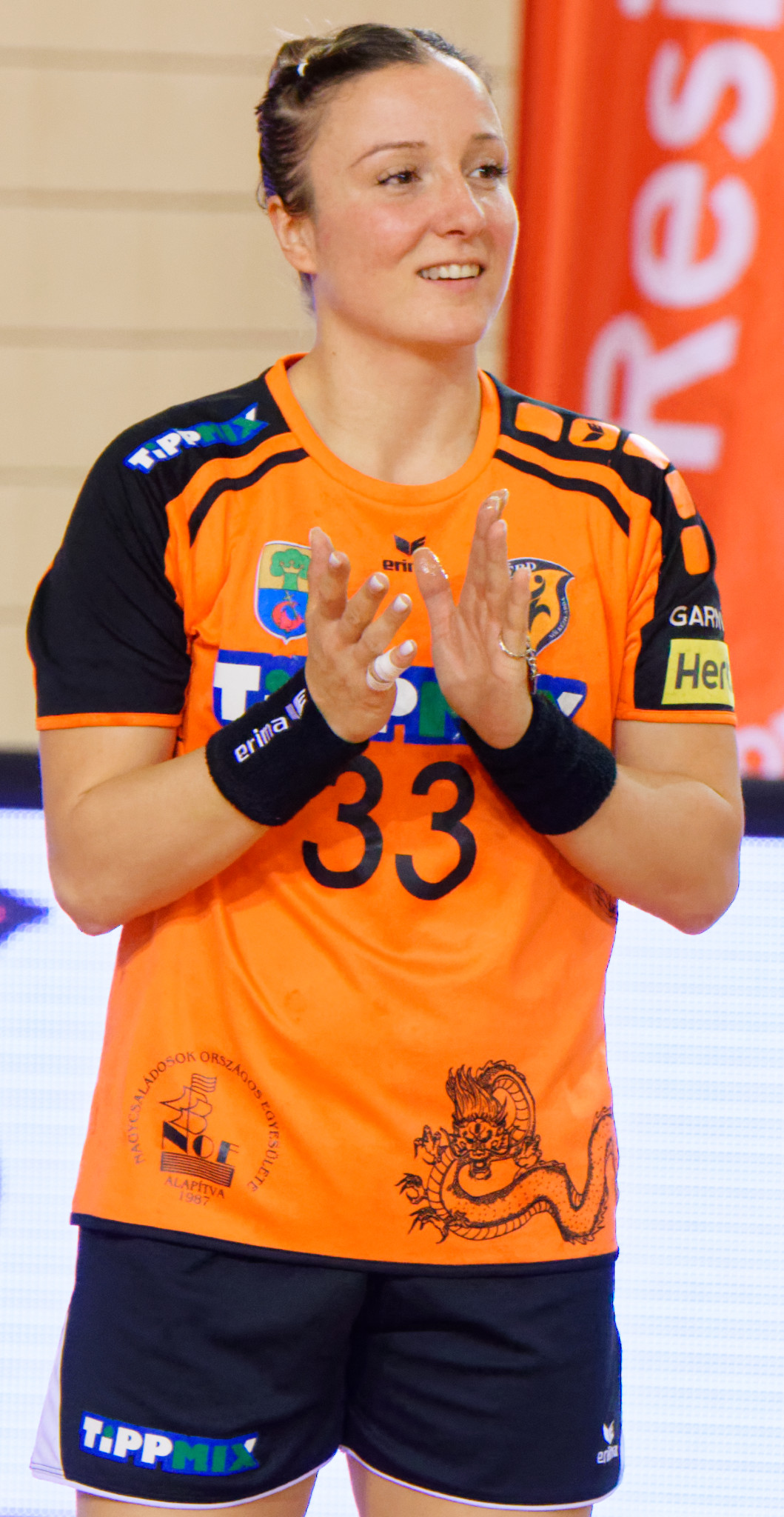 Rencontre retour du 3e tour de la coupe EHF, Issy Paris Hand / Erd. A Issy Les Moulineaux, le 18 novembre 2017.